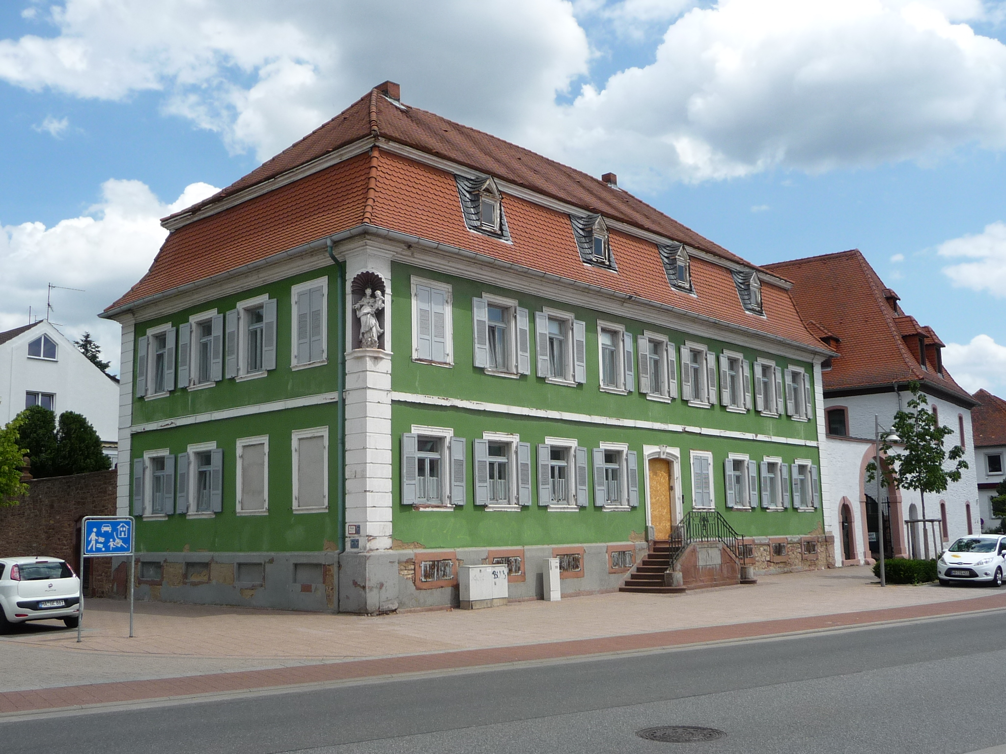 Lampertheim ist eine Stadt im Süden von Hessen im Kreis Bergstraße.